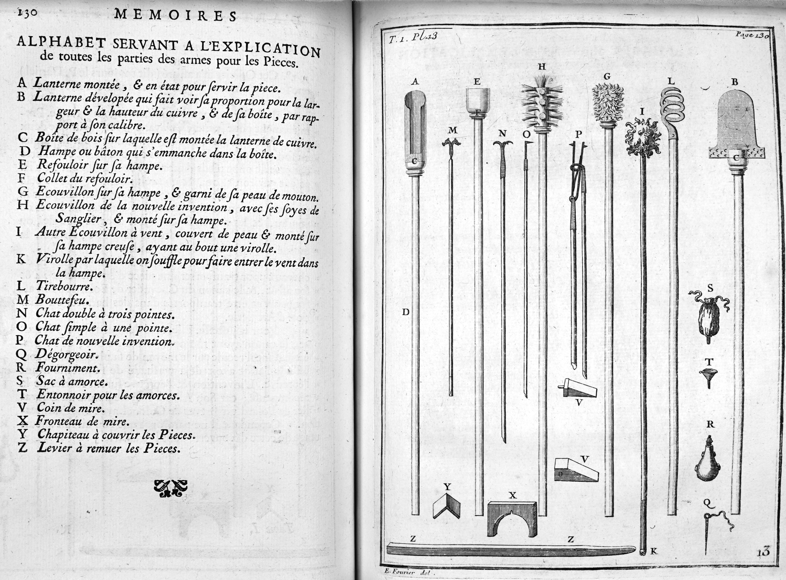 Mémoires d'artillerie, recueillis par M. Surirey de Saint Remy, exemplaire de la B.M. de Reims, troisième édition.